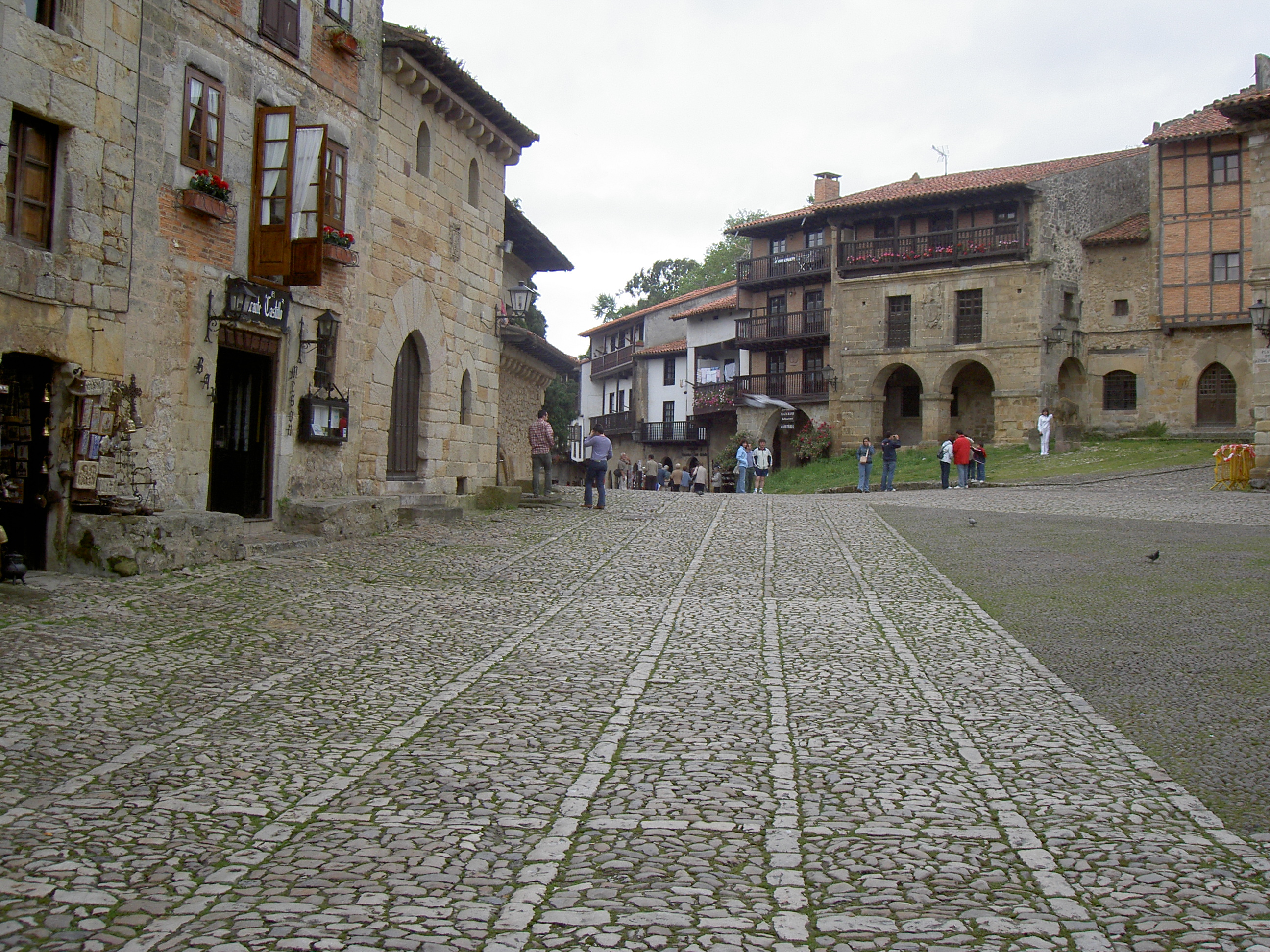 Santilla del Mar, Ortsmitte